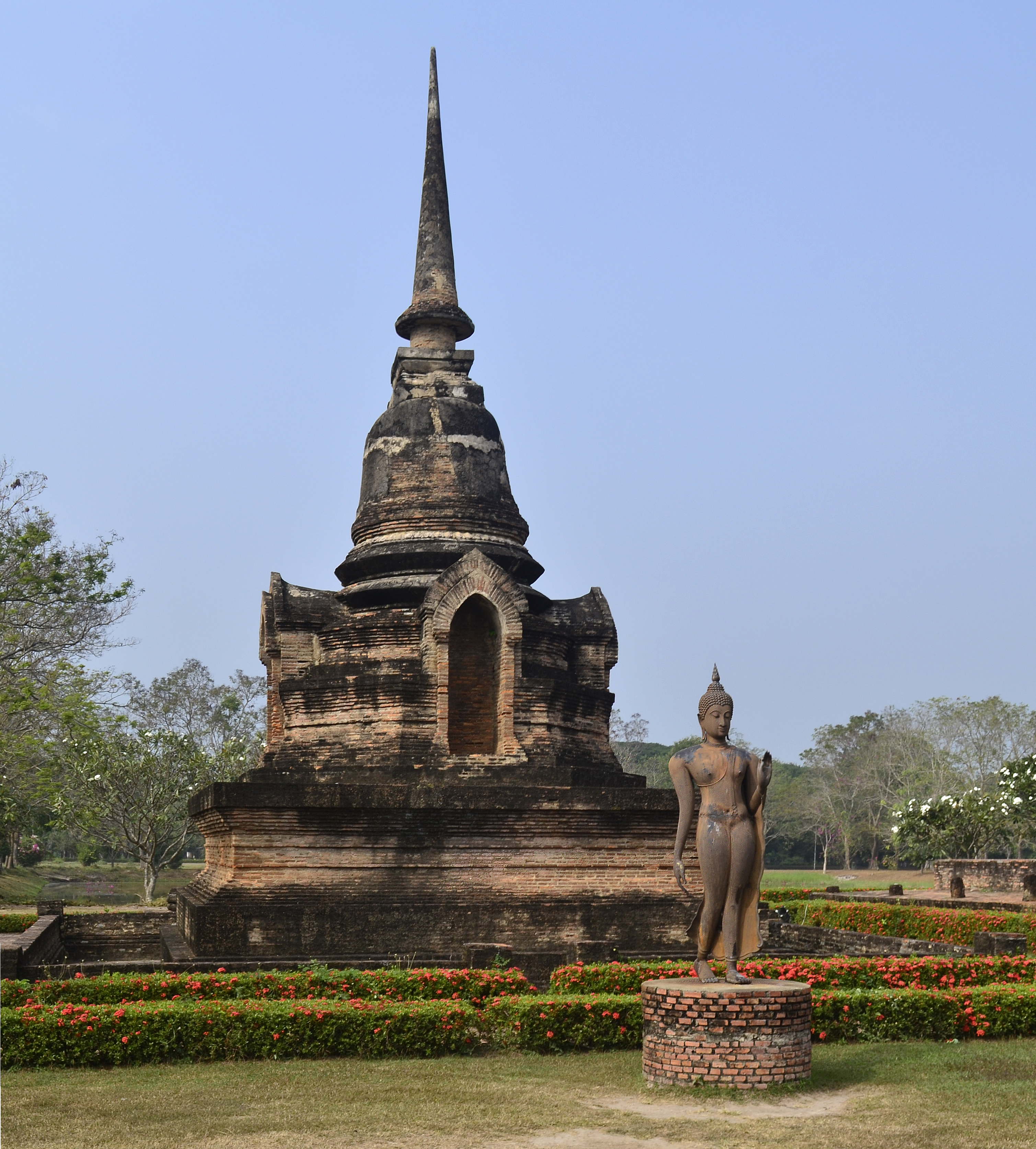 Nebenchedi des Wat Sa Si im Geschichtspark Sukhothai